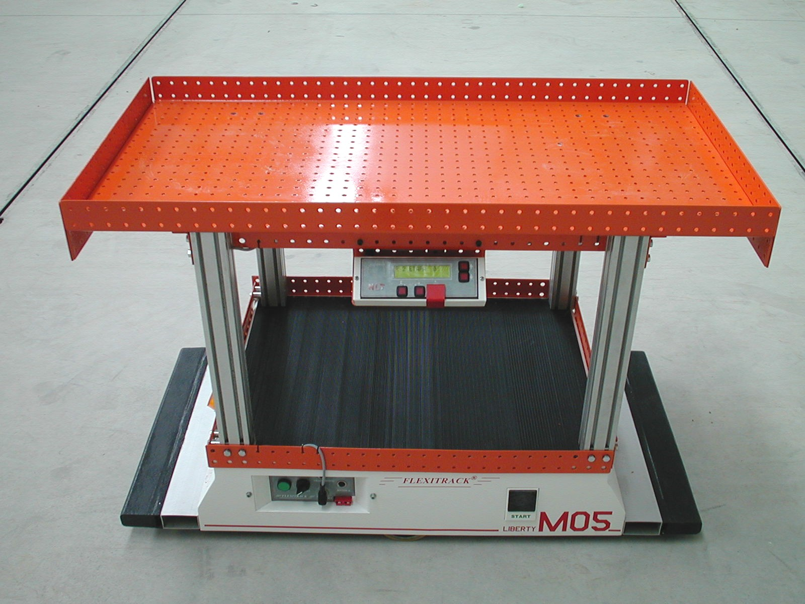 AGV para carga de explosivos